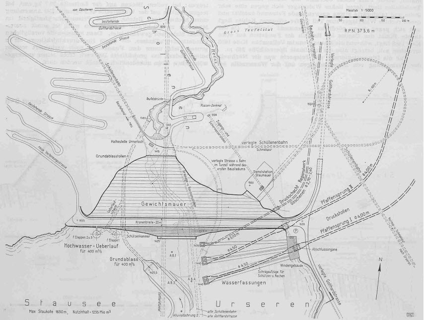 Lageplan der Staumauer in der Schöllenenschlucht für das Urserenkraftwerk-Projekt von 1943/44. Auf der rechten Seite ist der für die Schöllenenbahn vorgesehene Kehrtunnel zu erkennen.